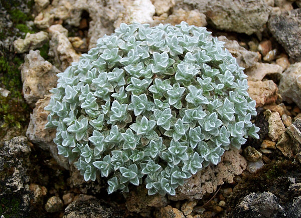 Plante endémique des Mts Dragensberg (Afr. du Sud) entre 2700 et 3150m, Coussin d'une dizaine de centimètres de haut. Fleur acaule, blanche de 1cm de diamètre. Sur paroie rocheuse et pierrier. (photo en culture)